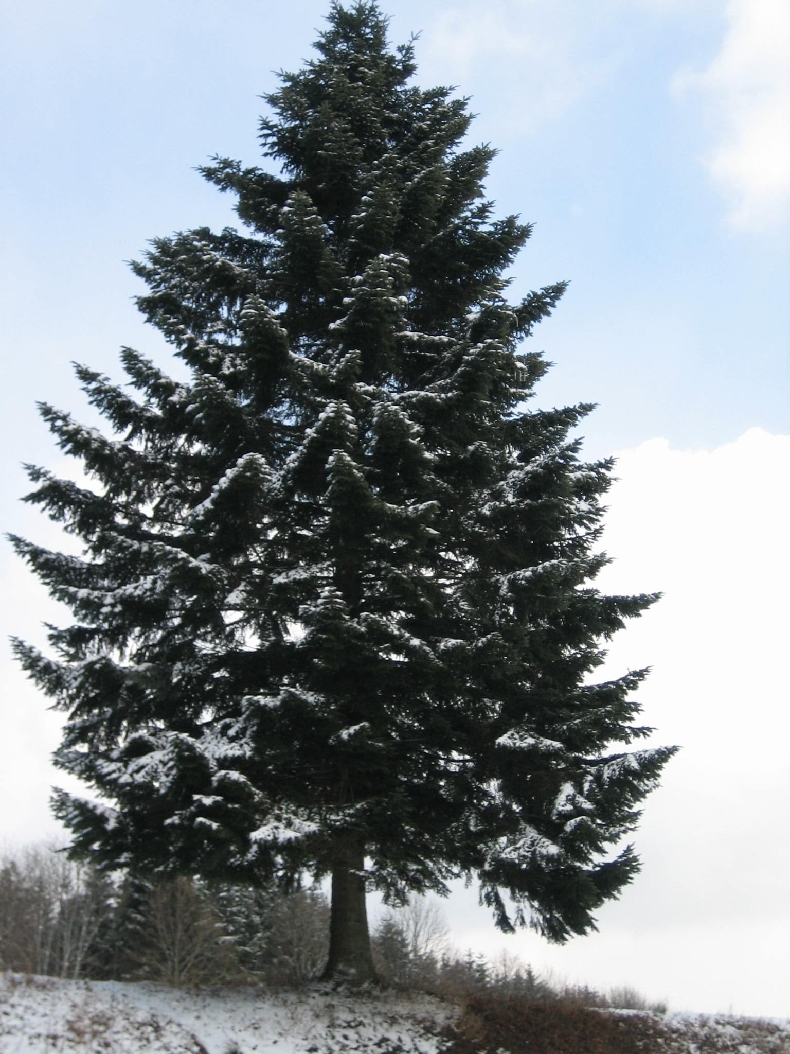 {fr} Sapin des Vosges (photo prise au hameau de Lanois, Ban-de-Sapt, France)